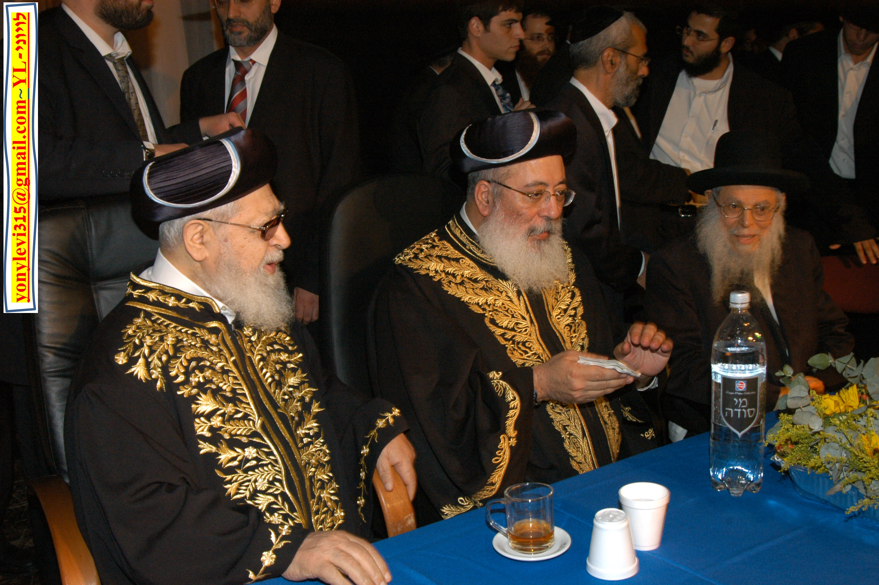 כינוס בנתיבות שאירגן הרב נתן בוקובזה ז"ל לכבוד בואו של הרב עובדיה יוסף לעיר, סיון התשס"ד. נראים משמאל לימין - הרב עובדיה יוסף, הרב שלמה משה עמאר, והרב יששכר מאיר